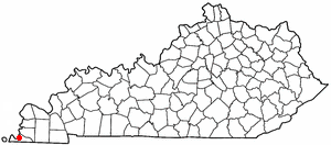 Volapük: Topam in tat: Kentucky.